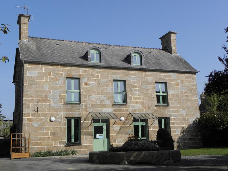 Mairie de Rimou (35).